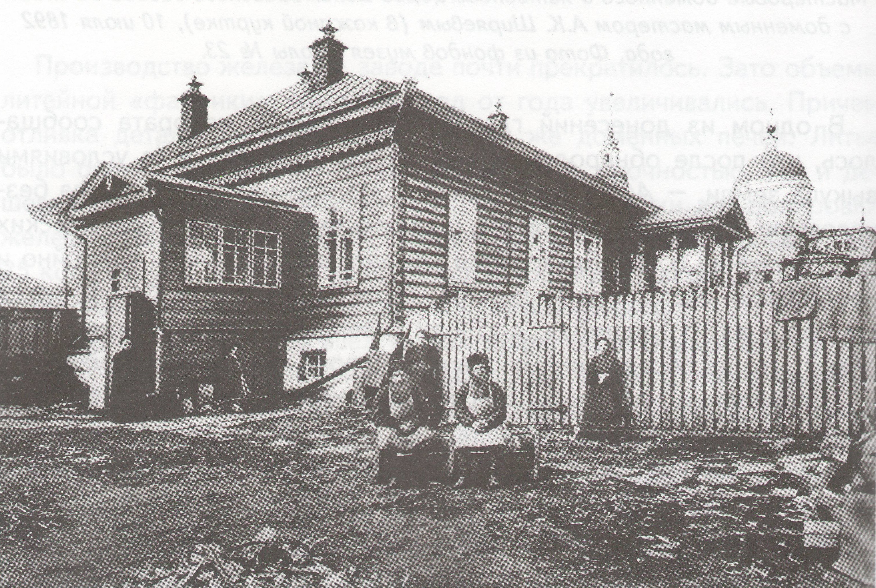 Дом управляющего Н.А.Тунева, начало XX века